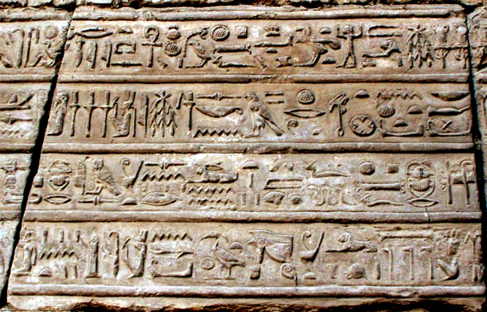 Hieroglifi v Karnaku